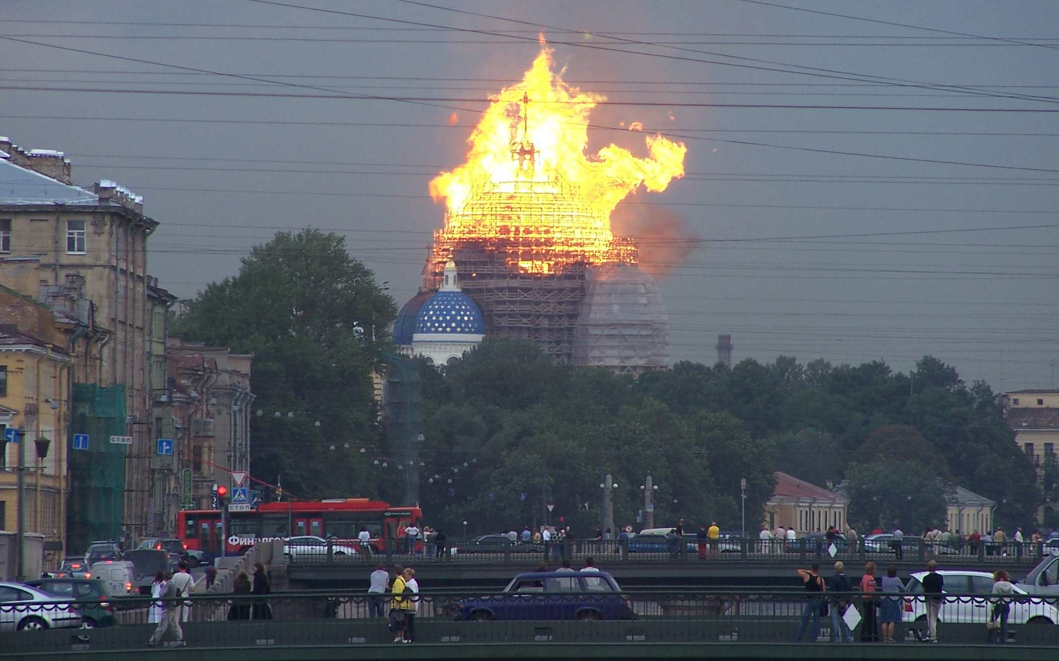 Троице-Измайловский собор горит 25 августа 2006 года